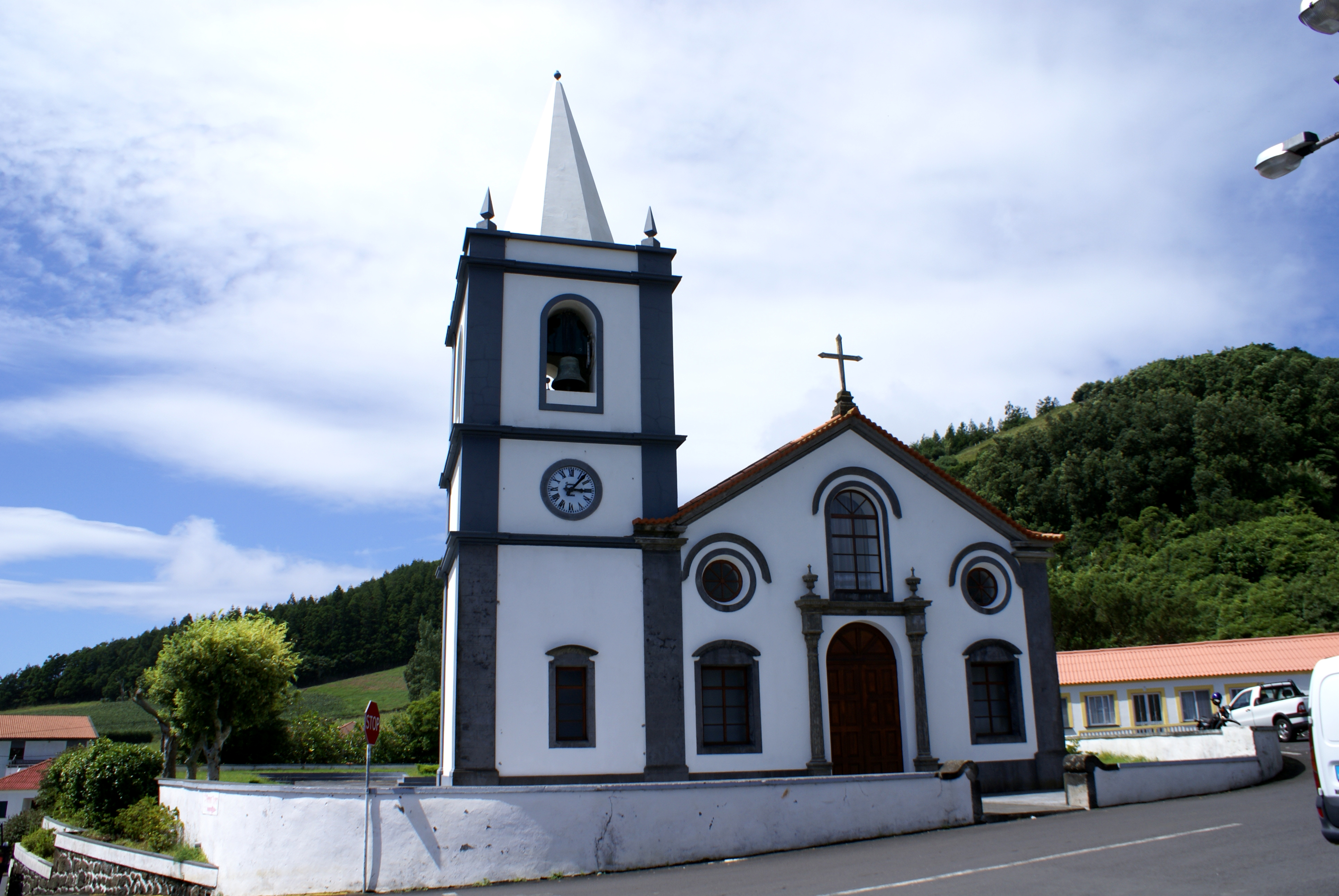 Igreja de Santo Amaro, fachada, Velas, ilha de São Jorge, Açores